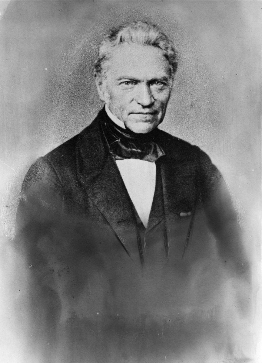 Lars Rasch (1797–1864), tidligere ordfører i Christiania. Fra Oslo Museums samling i Digitalt museum.